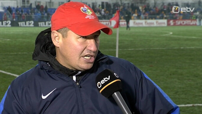 Чӑвашла: working